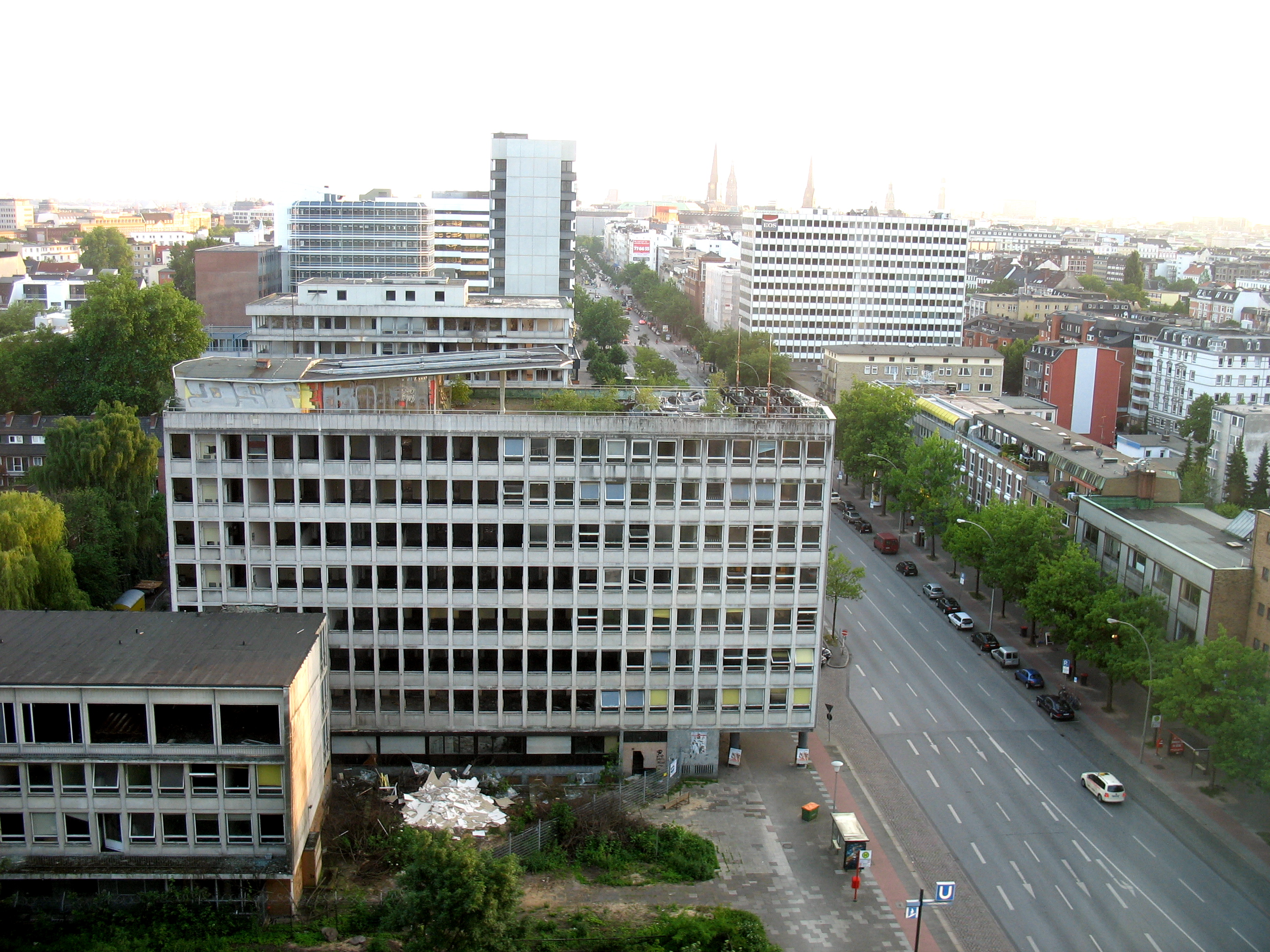 Ausblick aus dem Suitehotel Hamburg, vorn die seit ca. 1995 leerstehenden früheren Gebäude der DAK.